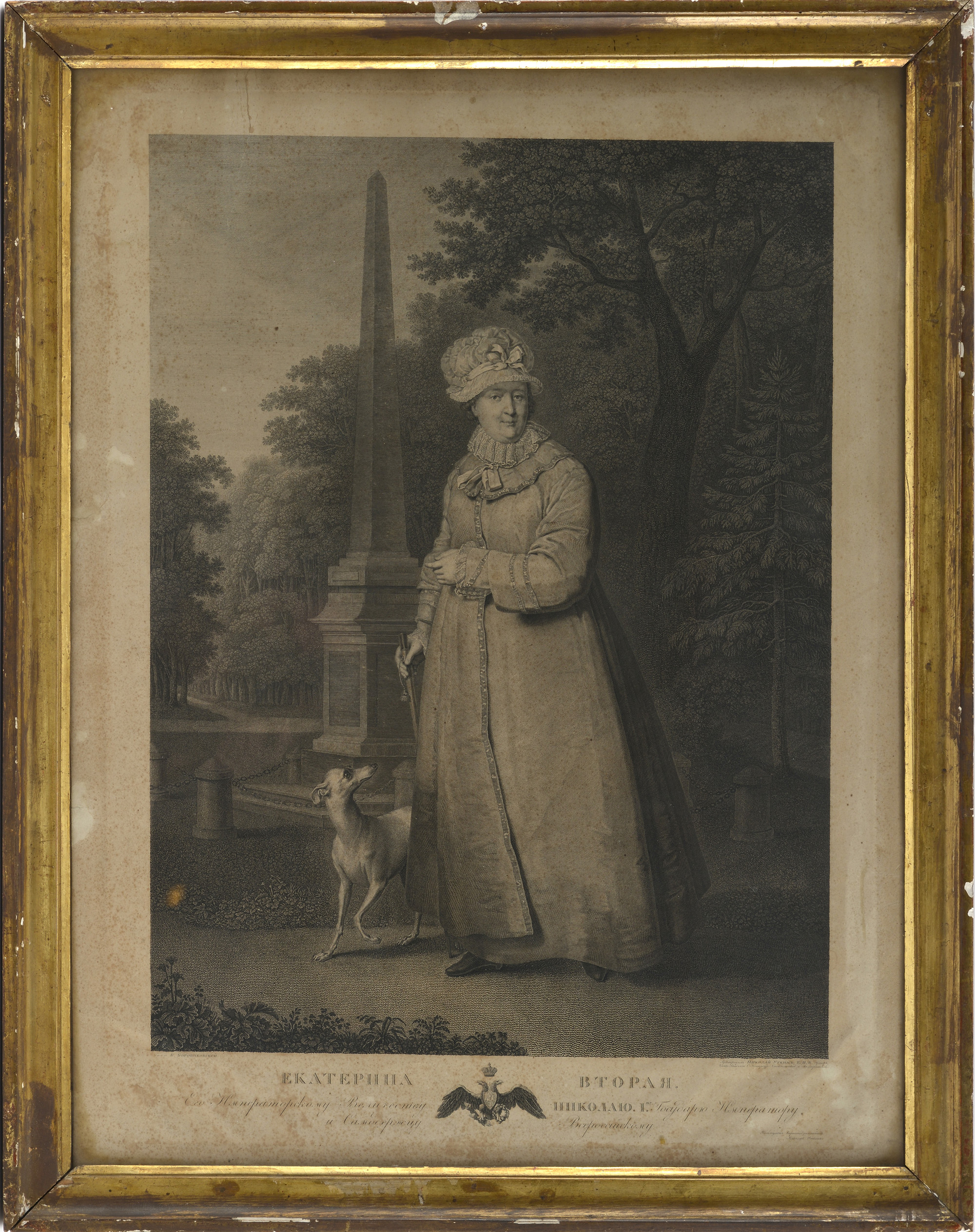 Портрет Екатерины II с оригинала В.Л. Боровиковского. Офорт, резец